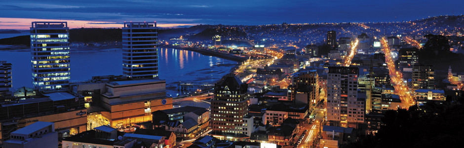 Puerto Montt